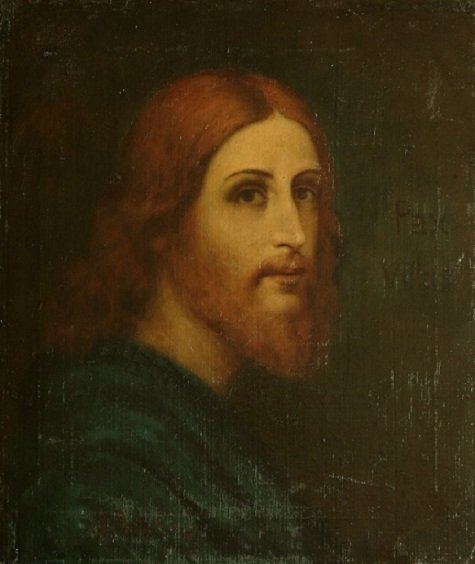 "Pax Vobis", olio su tela, 60 x 65 cm., Diocesi di Padova